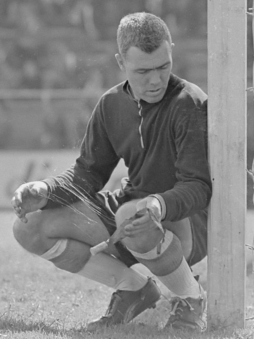 Norrköping, de doelman gebruikt vliegenvangerslijm om zijn effectiviteit te vebeteren 14 juli 1963